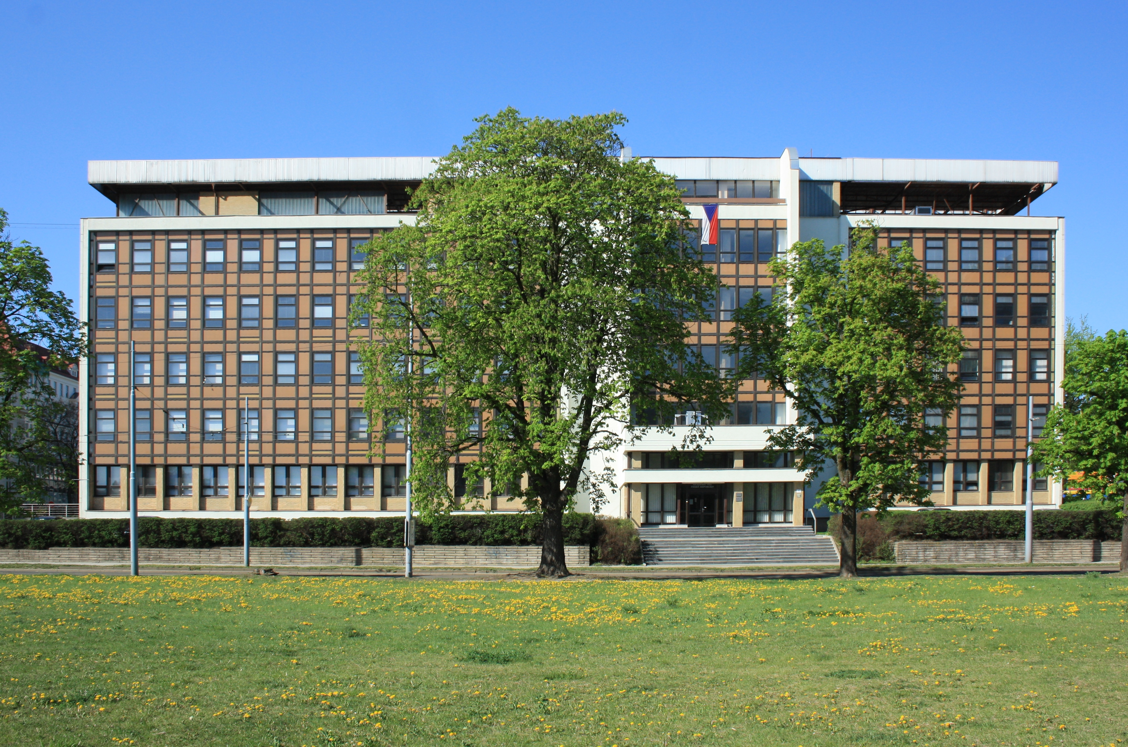 Akademie věd, Brno, Jihomoravský kraj